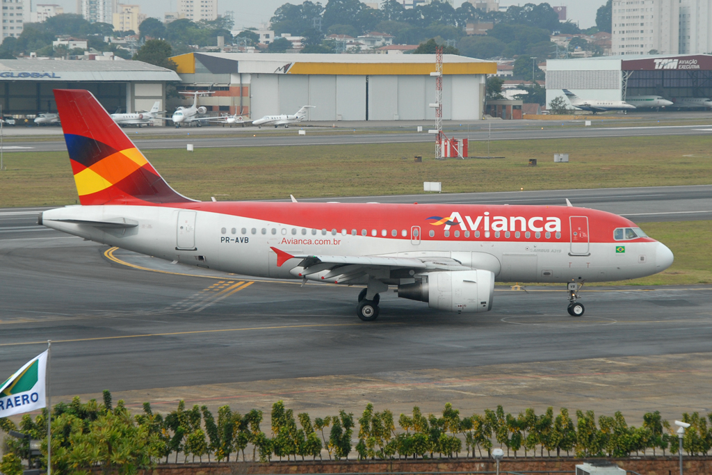 PR-AVB@ CGH 17AUG14